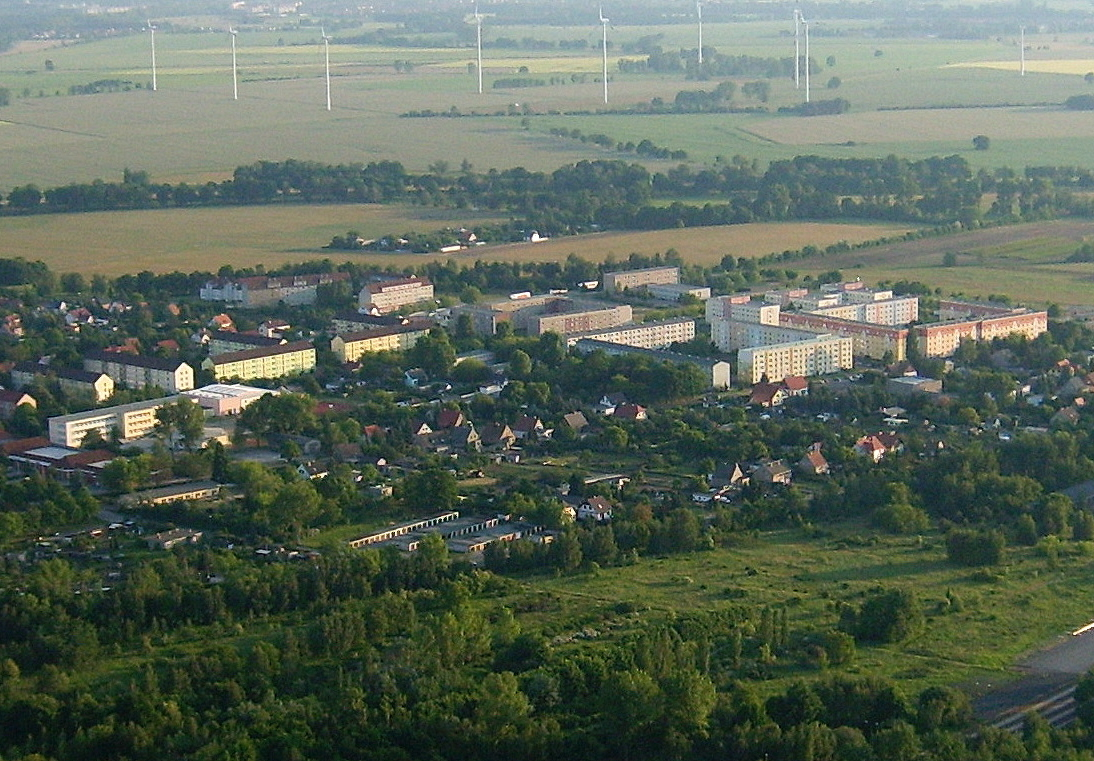 Das Wohngebiet-West in Elsterwerda.